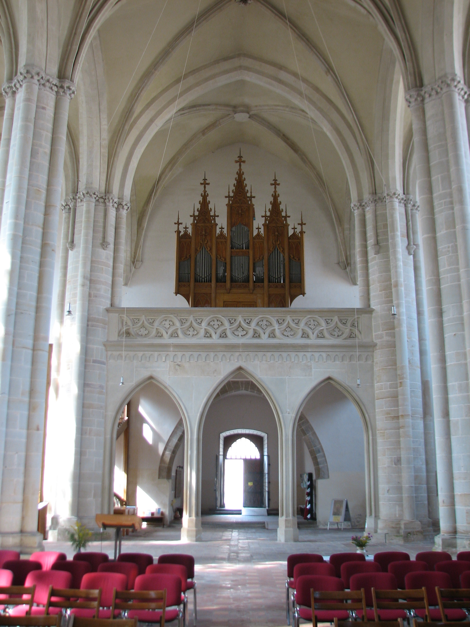 Klosterkirche St. Marien und St. Cyprian, Blick zur Orgelempore und zum Portal